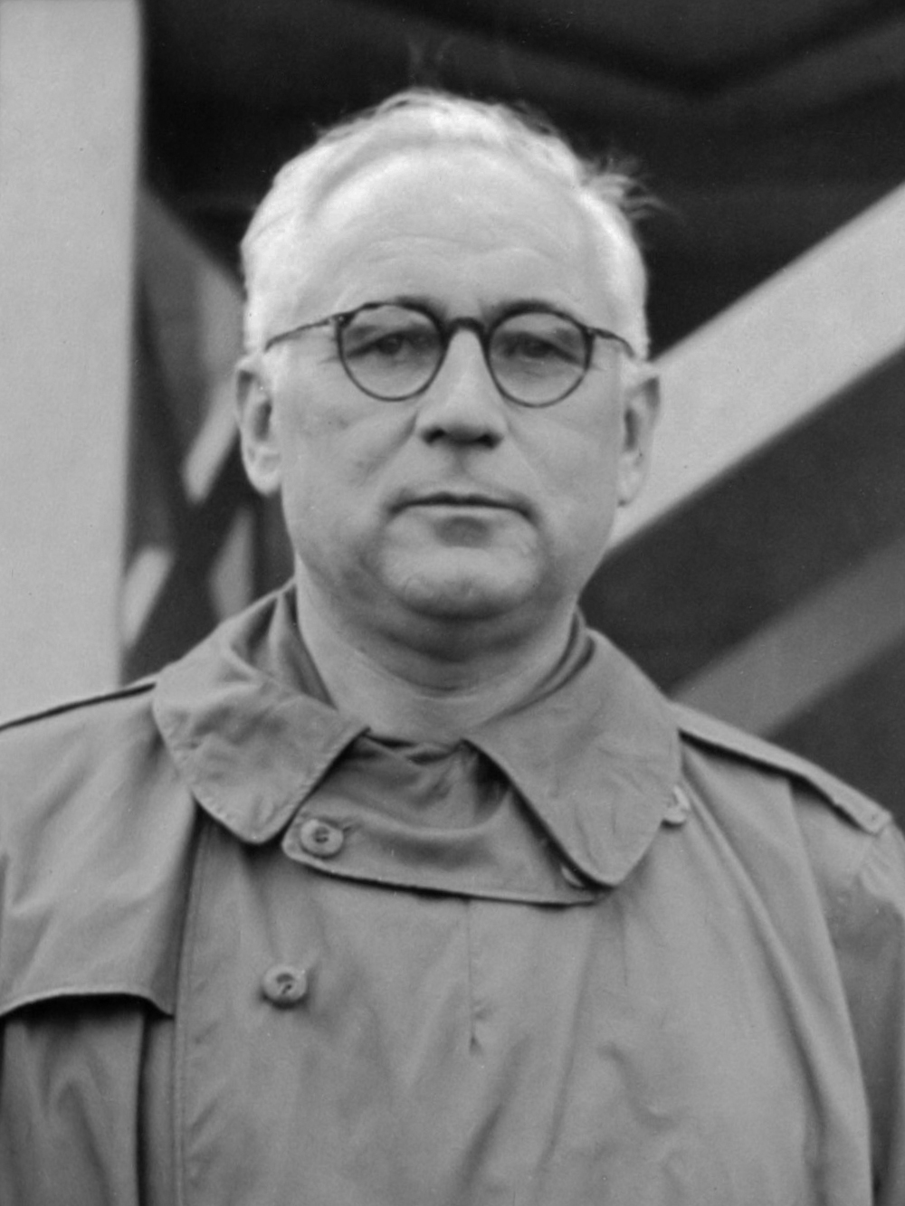 De Amsterdamse oud-burgemeester F. de Boer, [en oud-directeur van de Stoomvaart Maatschappij Nederland], [en opgestapt als lid van de Commissie-Generaal], keerde met de Skymaster 301 terug uit Nederlands-Indië ongedateerd